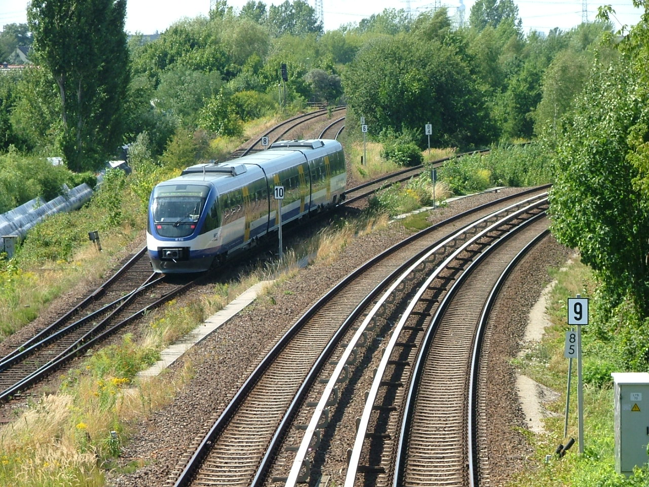 NE 26 von Biesdorfer Kreuz Ost (BBIKO) in Richtung Berlin-Lichtenberg 2008